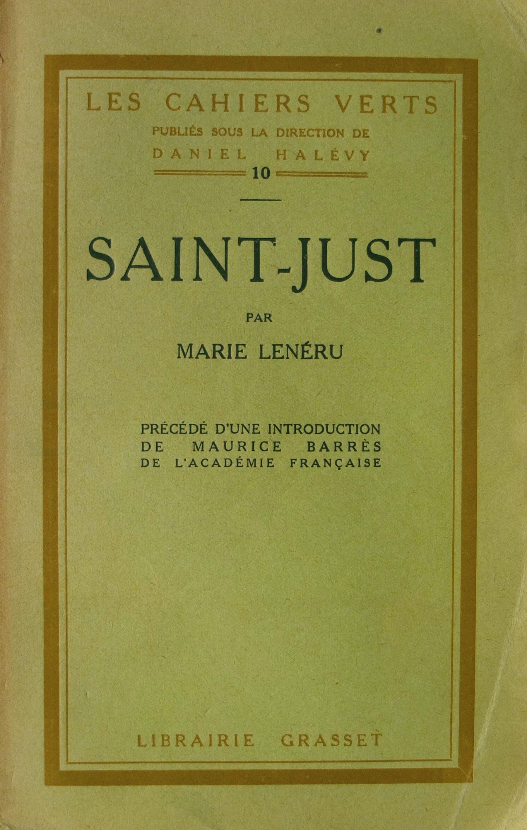 Saint-Just de Marie Lenéru. Couverture collection Les Cahiers verts n°10, éditions Grasset (Paris).